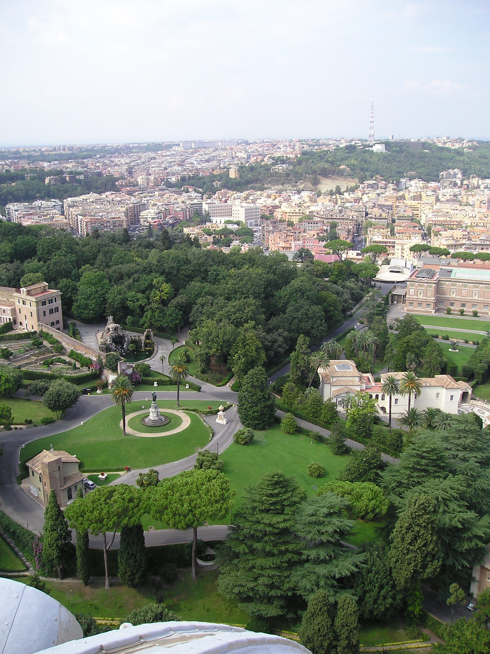 Vatican - garden